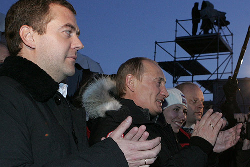 МОСКВА, ВОРОБЬЁВЫ ГОРЫ. На соревнованиях на Кубок мира по фристайлу.